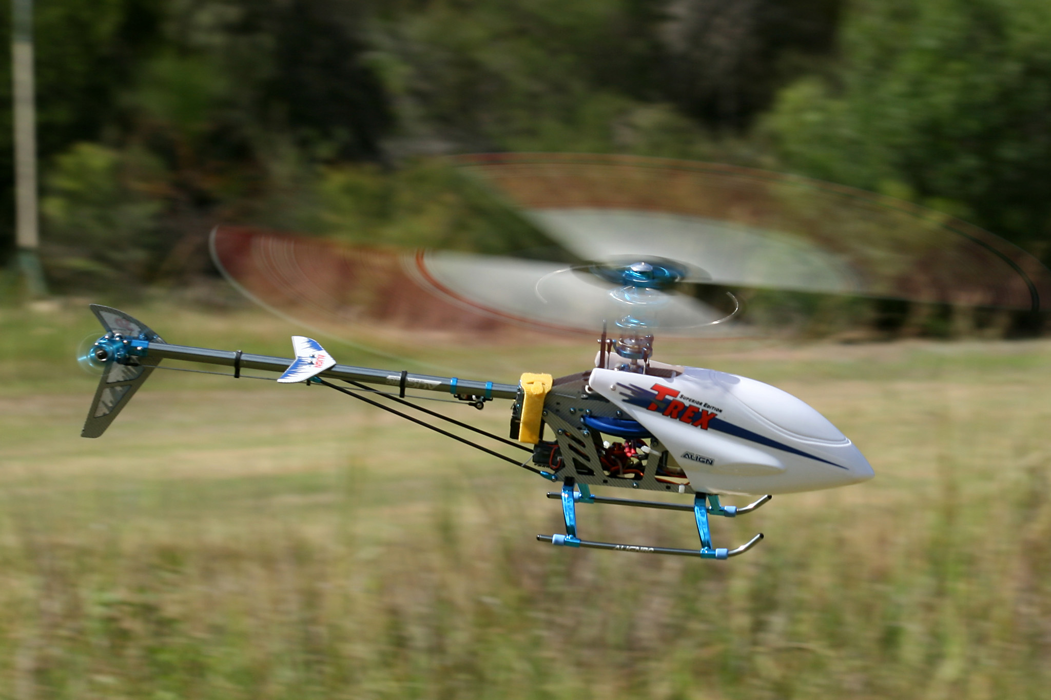 Align T-REX 450SE